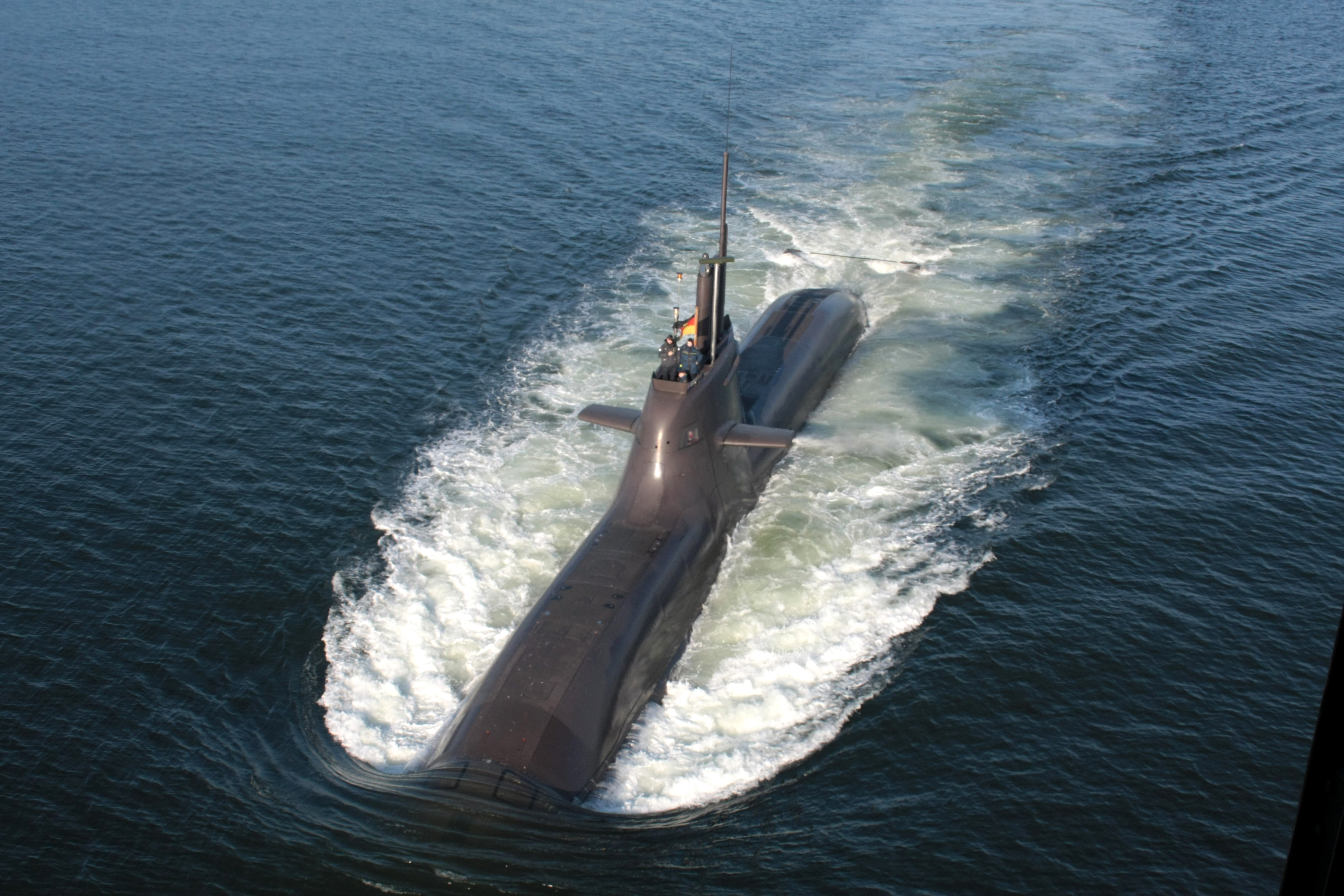 Unterseeboot der Klasse 212A, U-32 in See. ©Bundeswehr/Schönbrodt